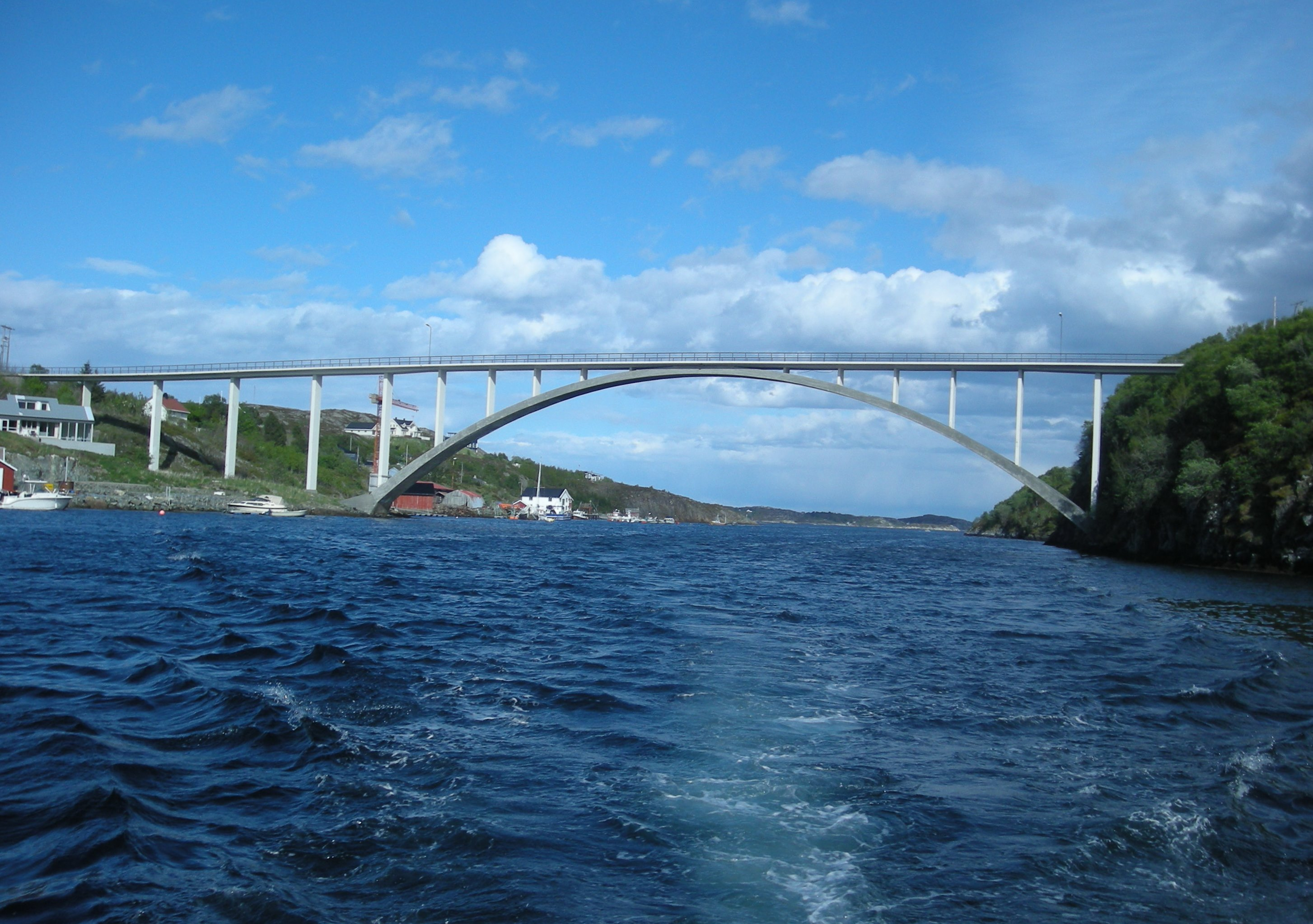 Knarrlagsundet bro mellom Fjellværsøya og Ulvøya (Hitra kommune, Trøndelag)